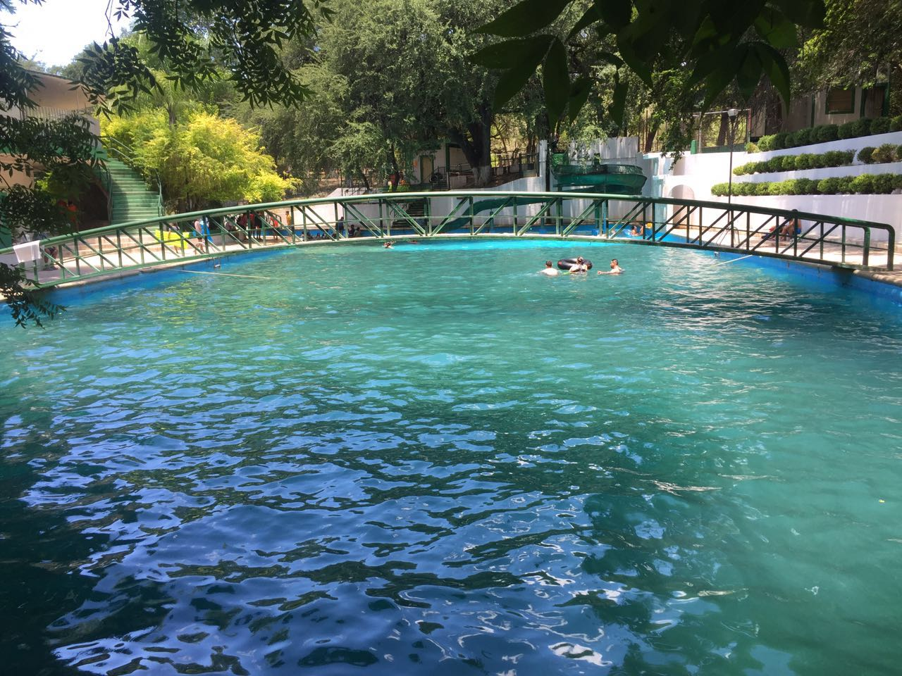 Alberca del Ojo de Agua de Sabinas Hidalgo, Nuevo León, México.